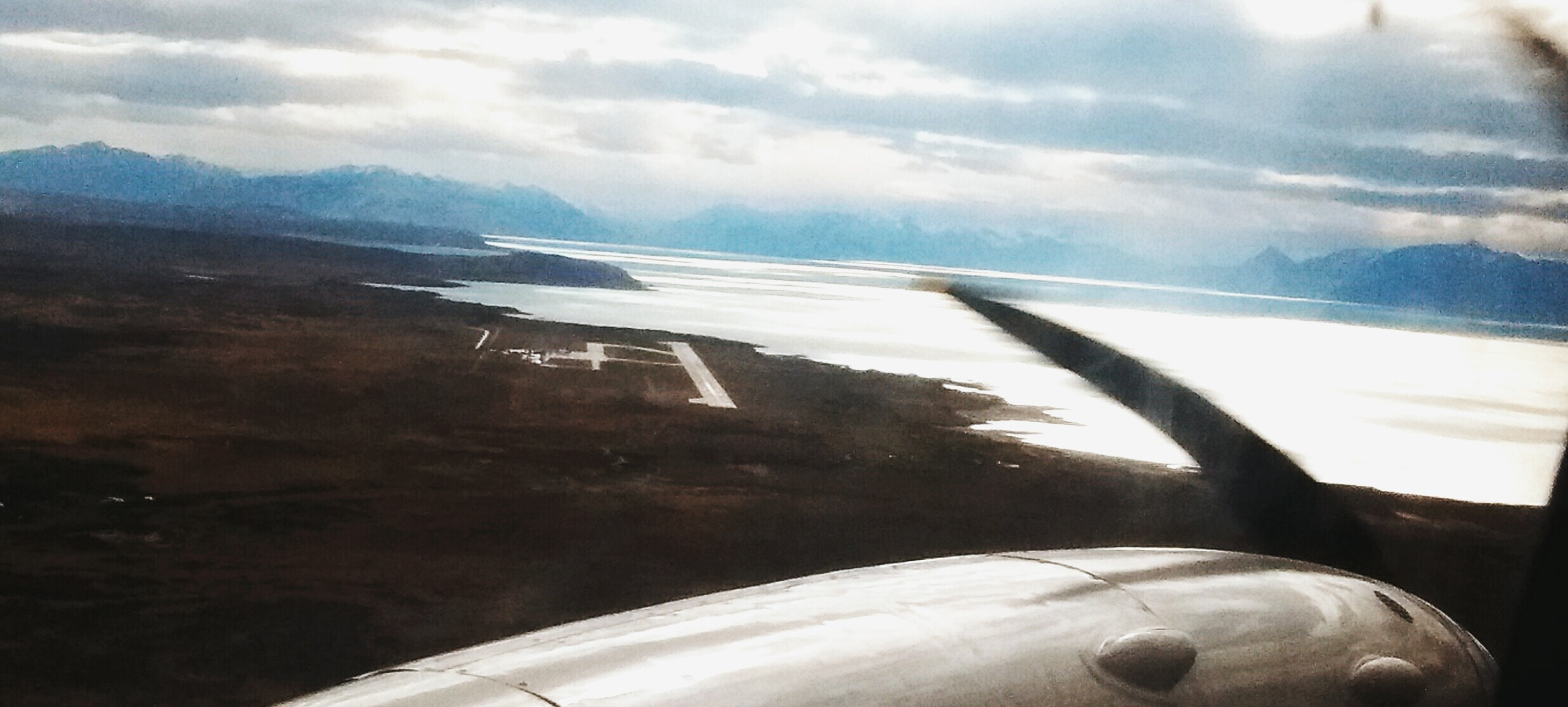 El aeropuerto de la ciudad junto al lago